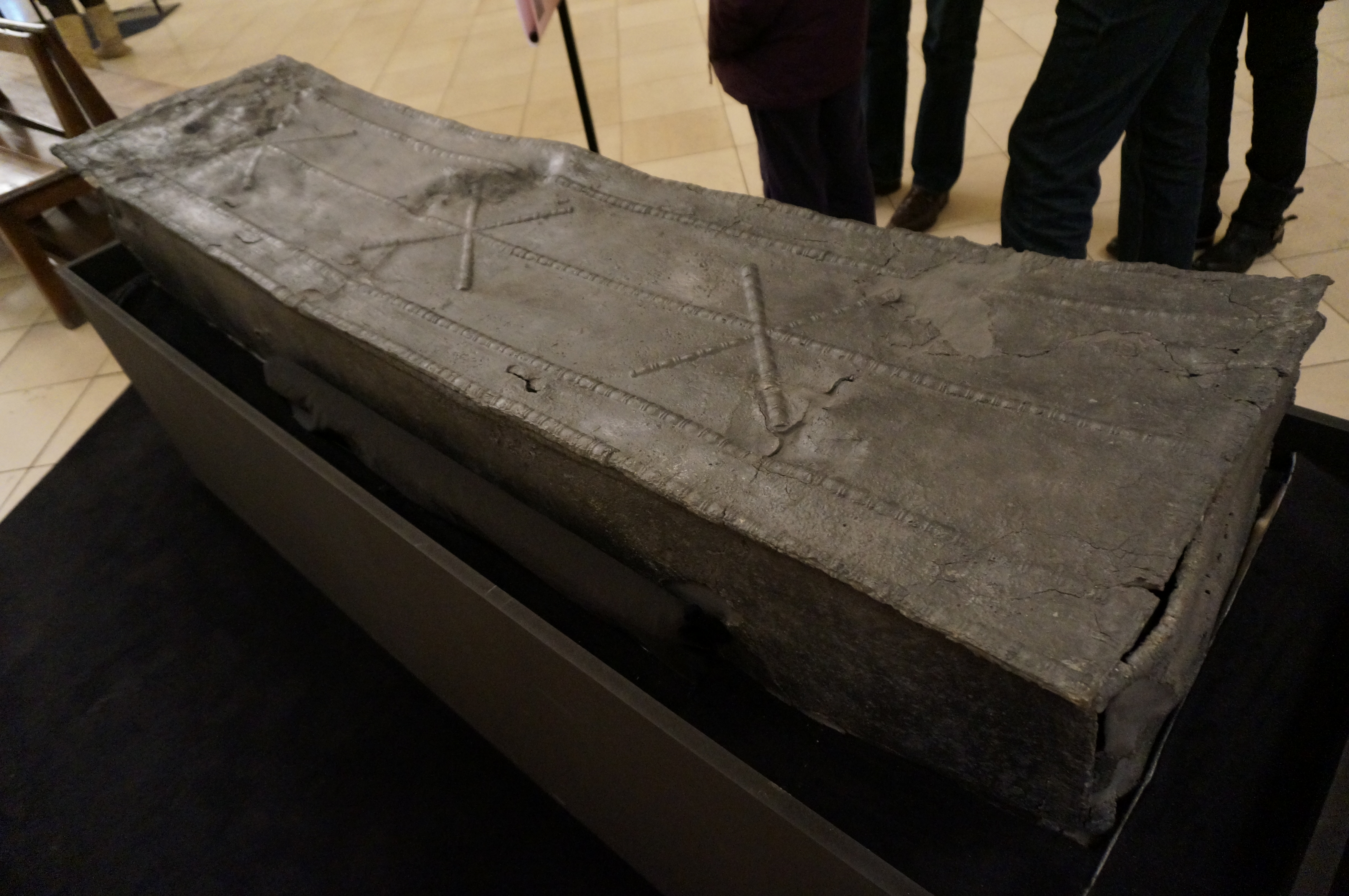 Au Musée st-Remi de Reims. Sarcophage en plomb du IIIe siècle après JC trouvée à Bezannes ZAC haut Torchant.